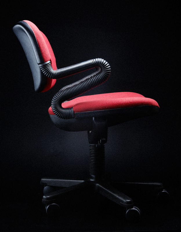 Vertabrae Chair Emilio Ambasz Krueger